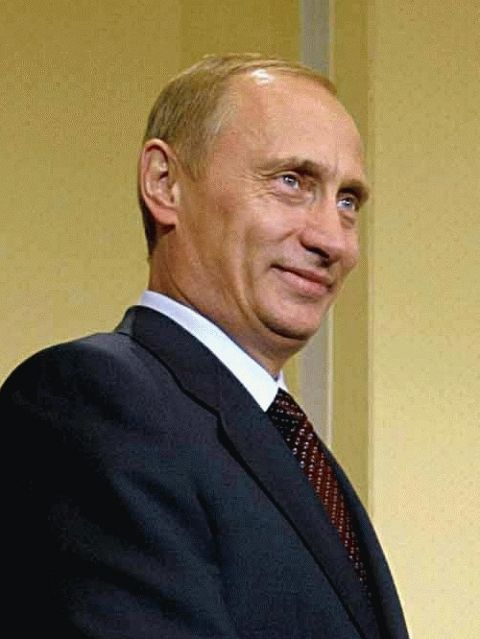 President Vladimir Putin of the Russian Federation.